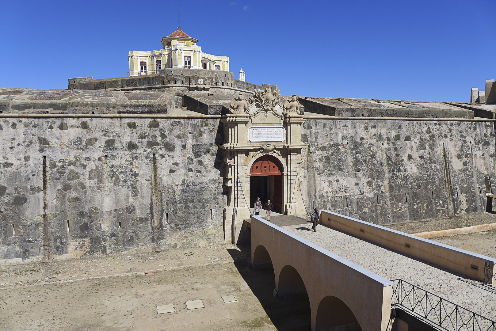 Portugal-Elvas-Forte de Nossa Senhora da GraçaP1170667